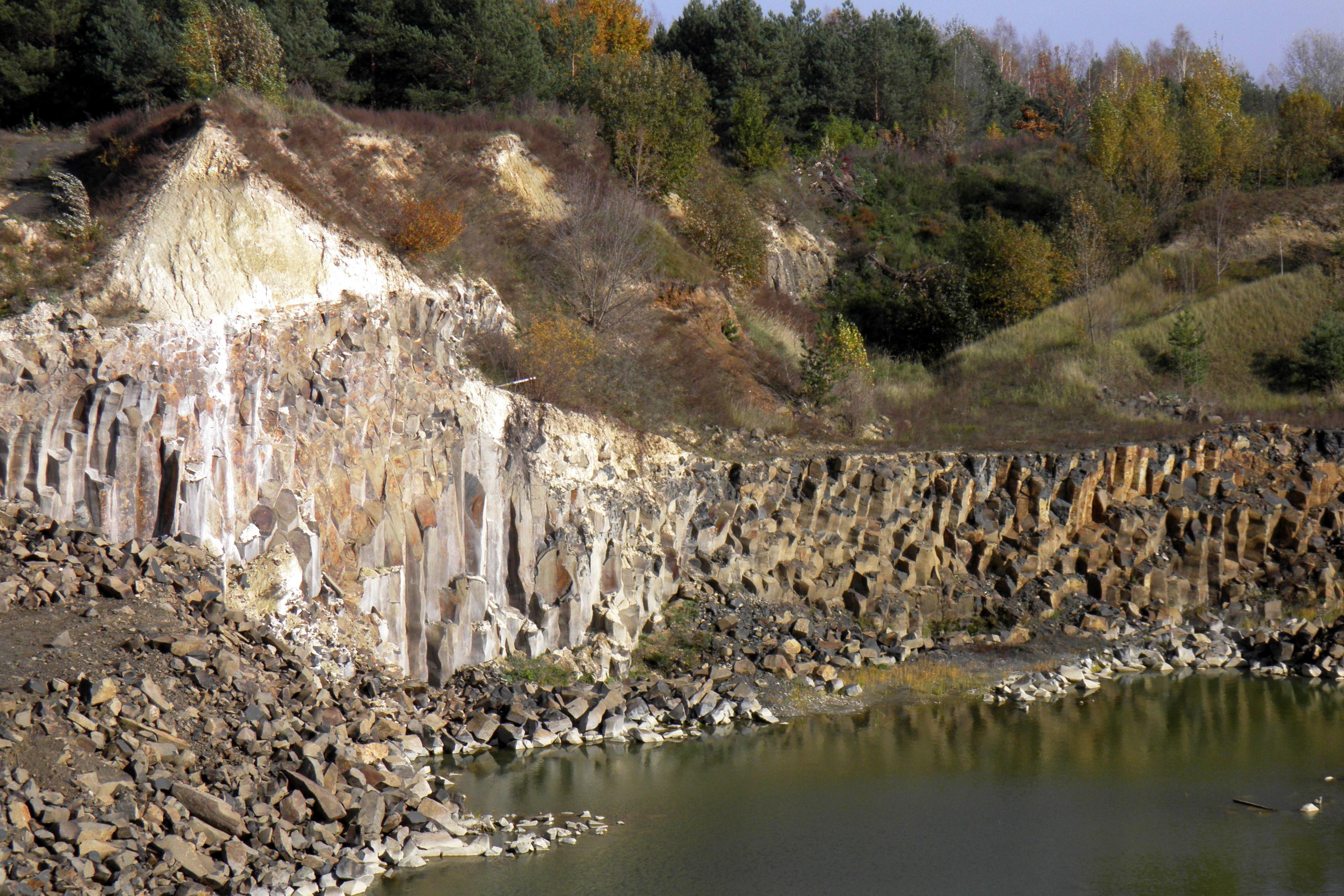 Памятка природи "Базальтові стовпи" на Рівненщині